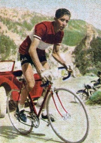 Federico Bahamontes en 1960 - Campioni dello Sport vers 1965